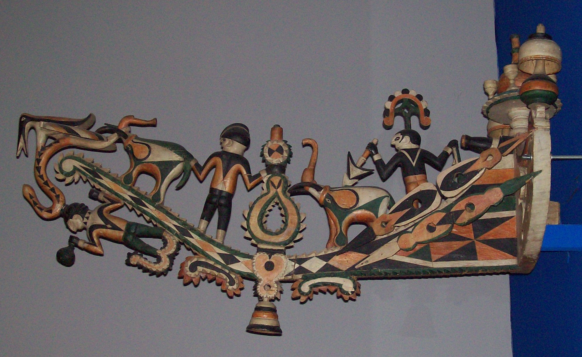 Schiffsschnabel (Duala, Kamerun, 19. Jahrhundert). Die Duala, die in der Mündung des Flusses Wauri wohnen, standen schon in vorkolonialer Zeit in intensiven Kontakt zu Europäern. In der Kunst entstand so ein Mischstil. Die Schnitzer übernahmen europäische Schreinertechicken und bunte Ölfarben, in ihrem Formenschatz verschmolzen sie fremde und traditionell Elemente. Die Dreitheit der Farben Weiß-Rot-Schwarz spielen im Kult der Flußdämonen ein Rolle. Das Objekt wurde durch den deutschen Arzt Max Buchner 1884 aus dem Haus des Lokalherrschers Kum’a Mbape Bell (Lock Priso Bell) entwendet. Sein Nachfahre, Alexandre Kum'a Ndumbe III., fordert die Rückgabe.